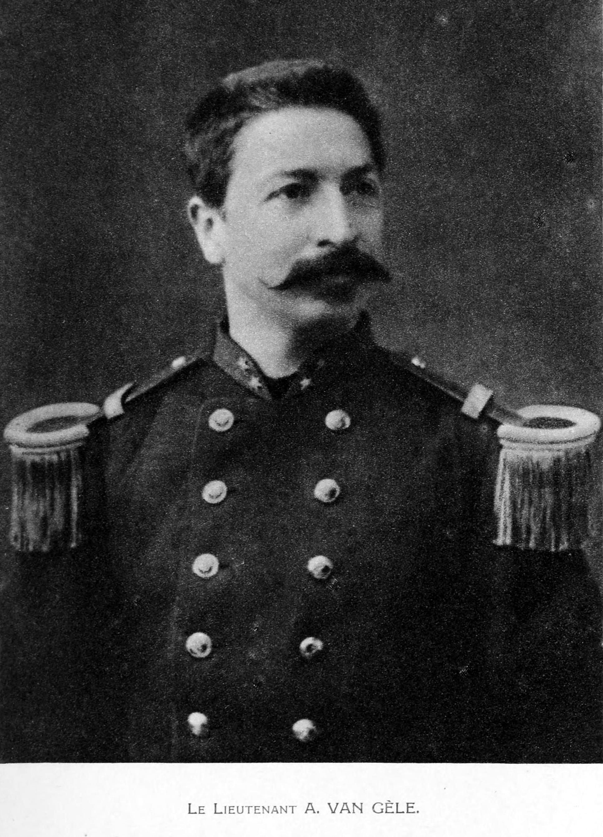 Le Lieutenant A. Van Gèle - p. 184